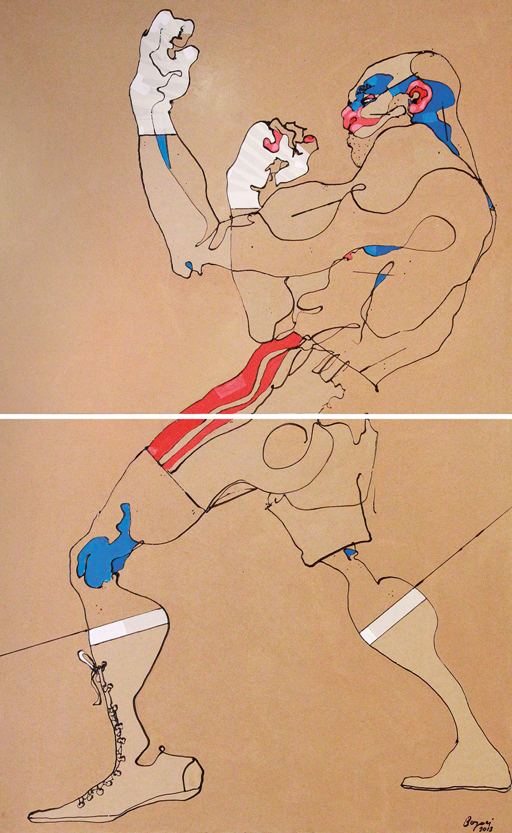 Der Boxer